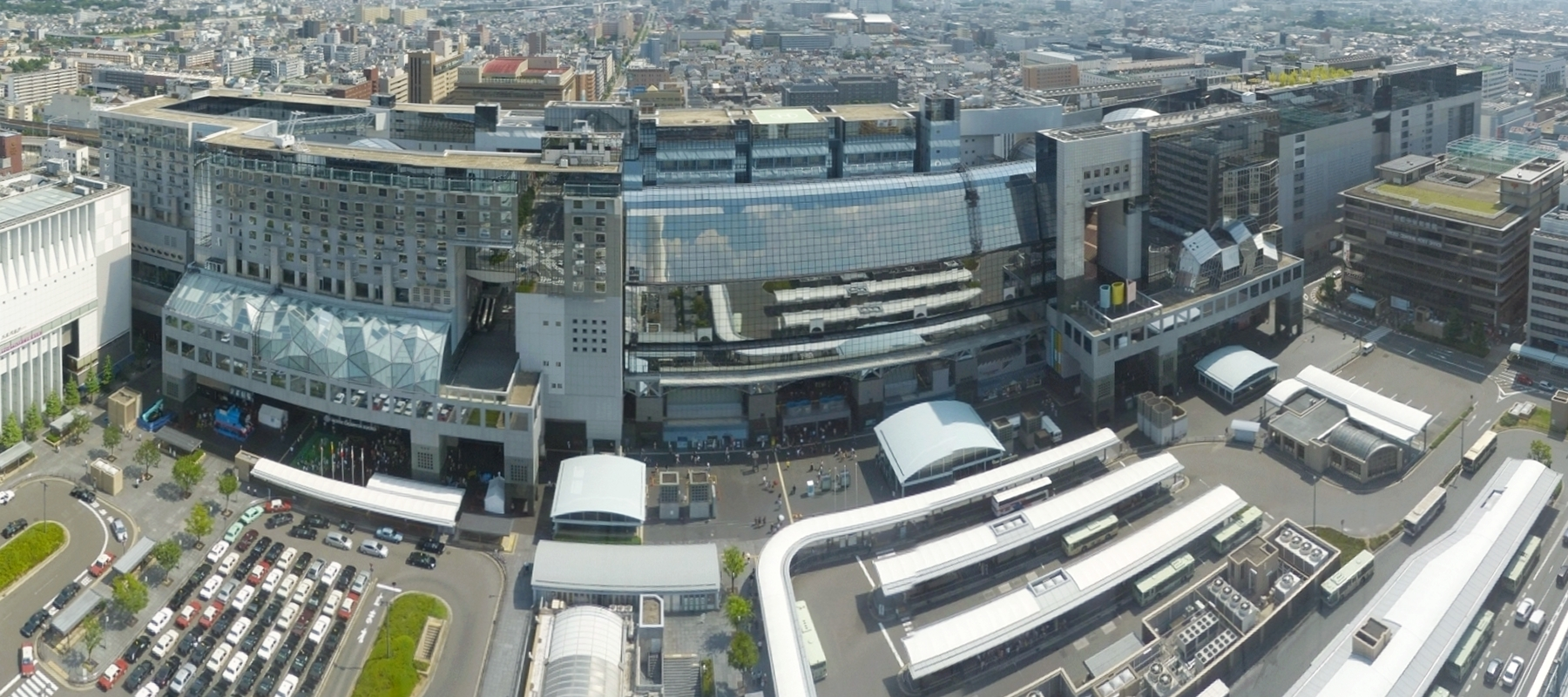 京都タワーから望む京都駅